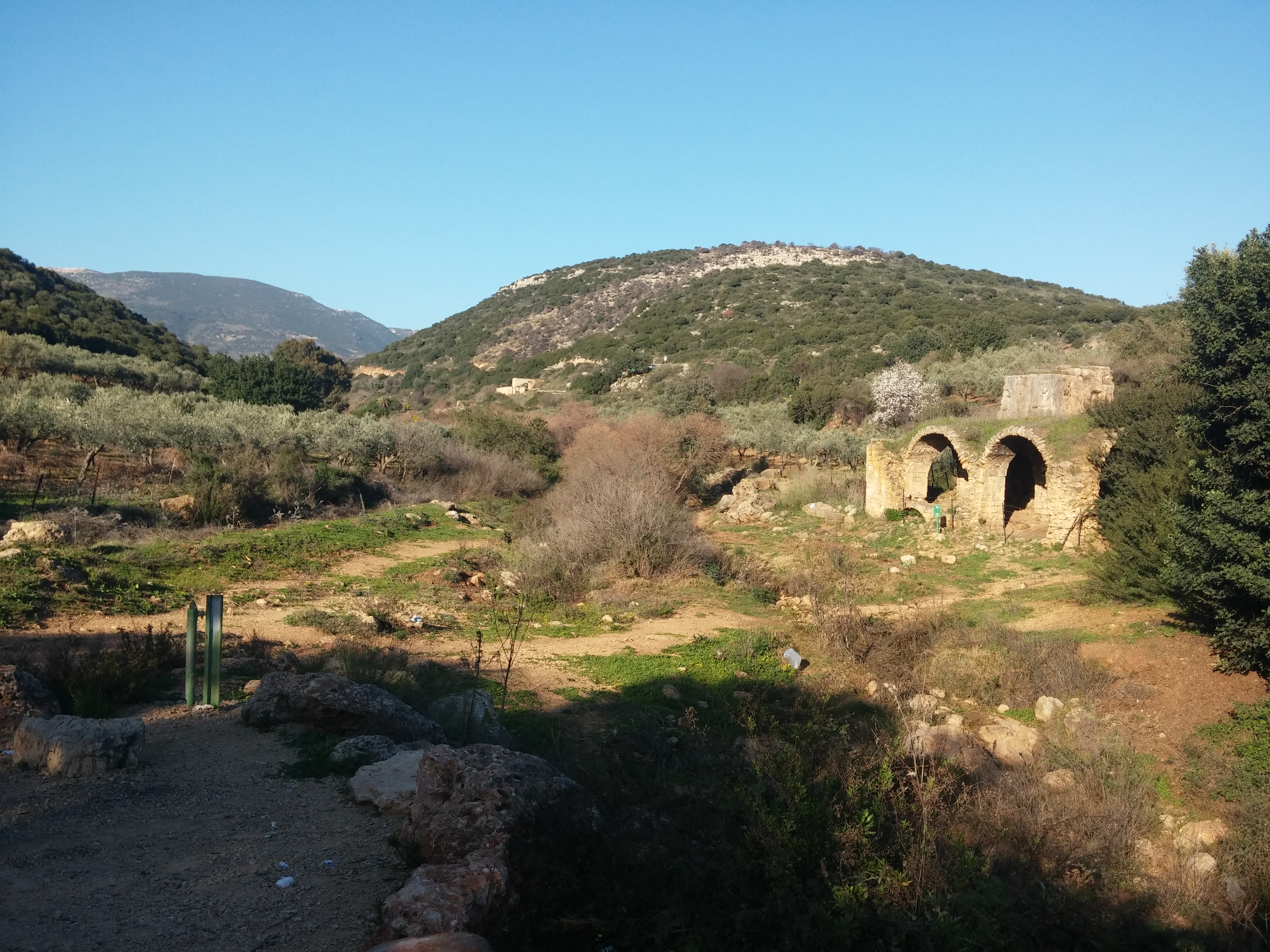 גן לאומי נחל צלמון, טחנות קמח, מים זורמים. Tzalmon Valley, Israel